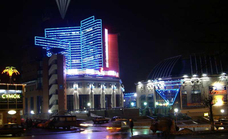 Ижевский цирк